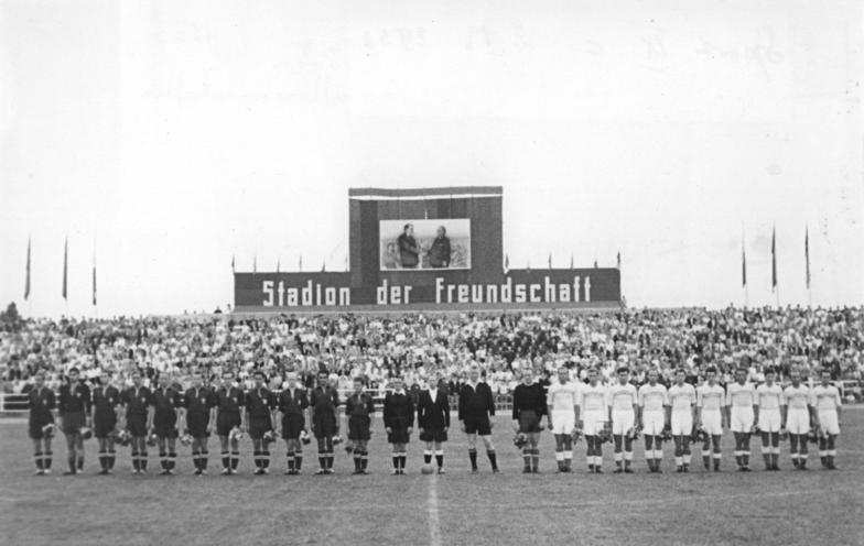 Zentralbild-Neuer Tag Str-Wi. 15.7.1953 Sportfest im Stadion der Freundschaft in Frankfurt-Oder. Zur 700-Jahrfeier der Stadt Frankfurt-Oder fanden am 12.7.1953 Sportveranstaltungen im neuerbauten Stadion der Freundschaft statt. UBz. Zwischen der DDR-Auswahlmannschaft Dynamo (dunkle Kleidung) und einer polnischen Auswahl-Mannschaft von Gwardia-Krakau und Gwardia-Warschau fand ein Fußballspiel statt.